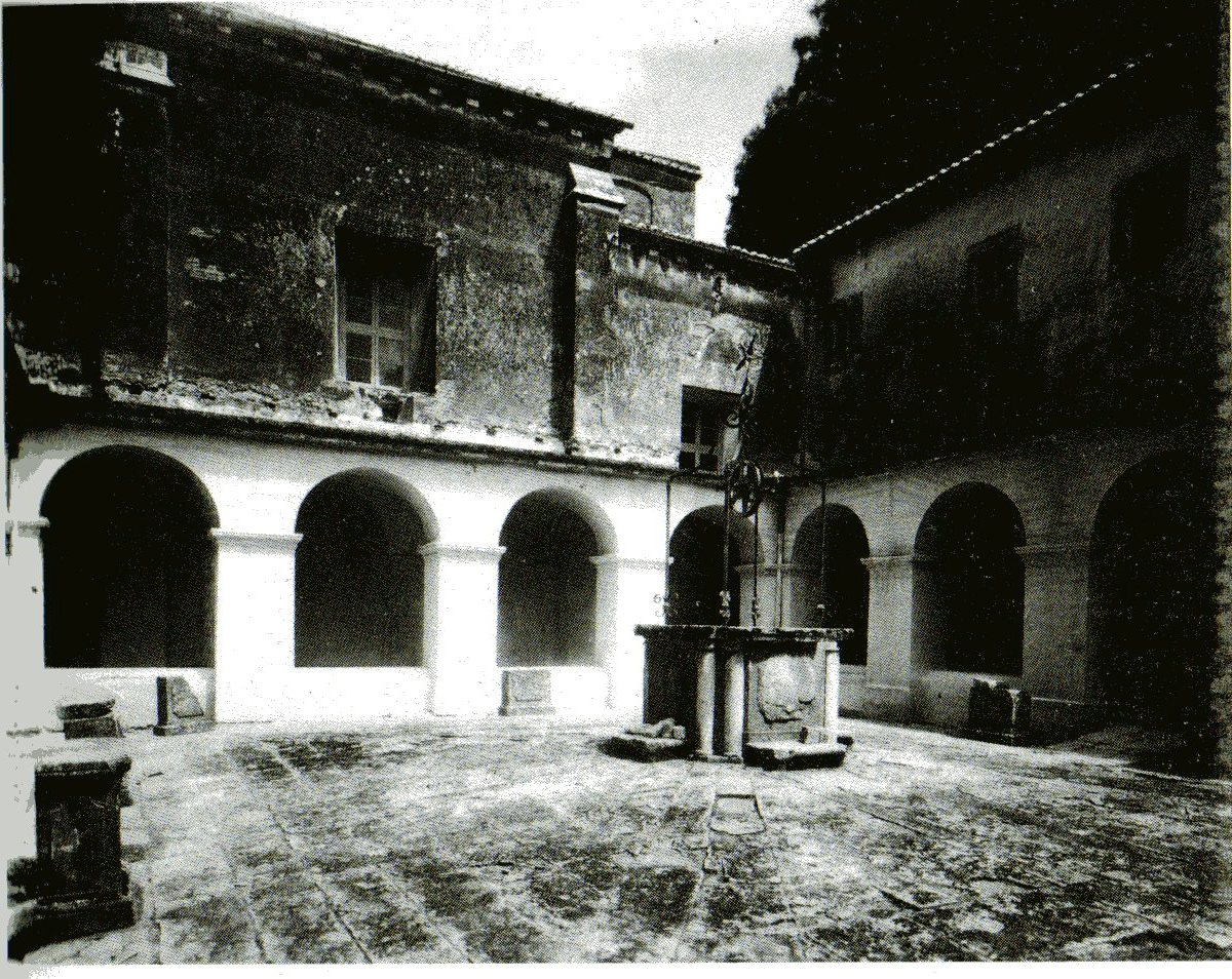 Chiostro di Palazzolo (Rocca di Papa, RM)